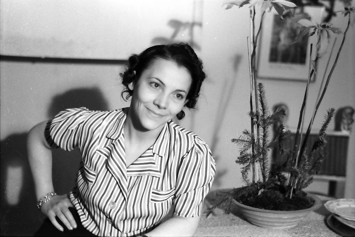 Kabarett der Komiker: Tatjana Sais